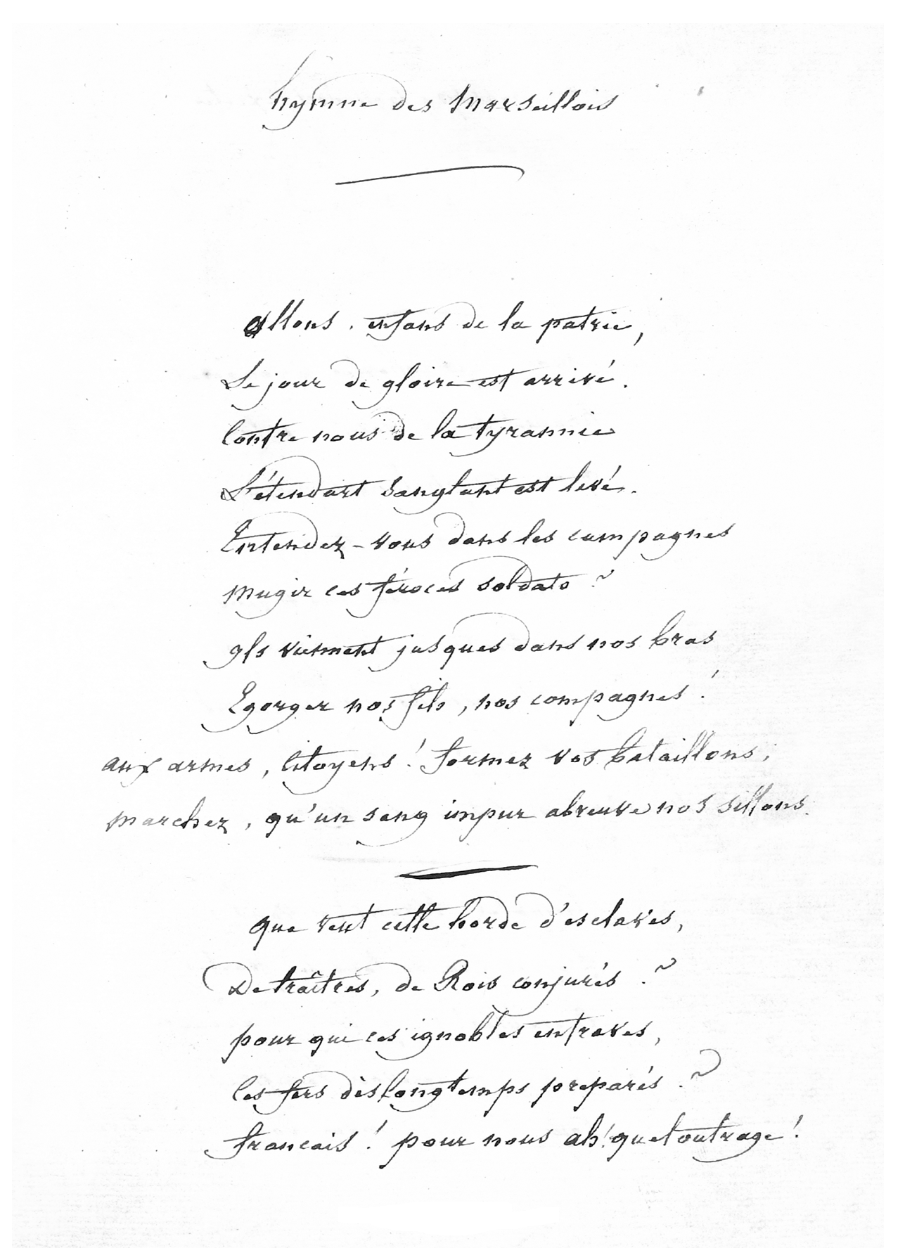 le manuscrit autographe de la Marseillaise